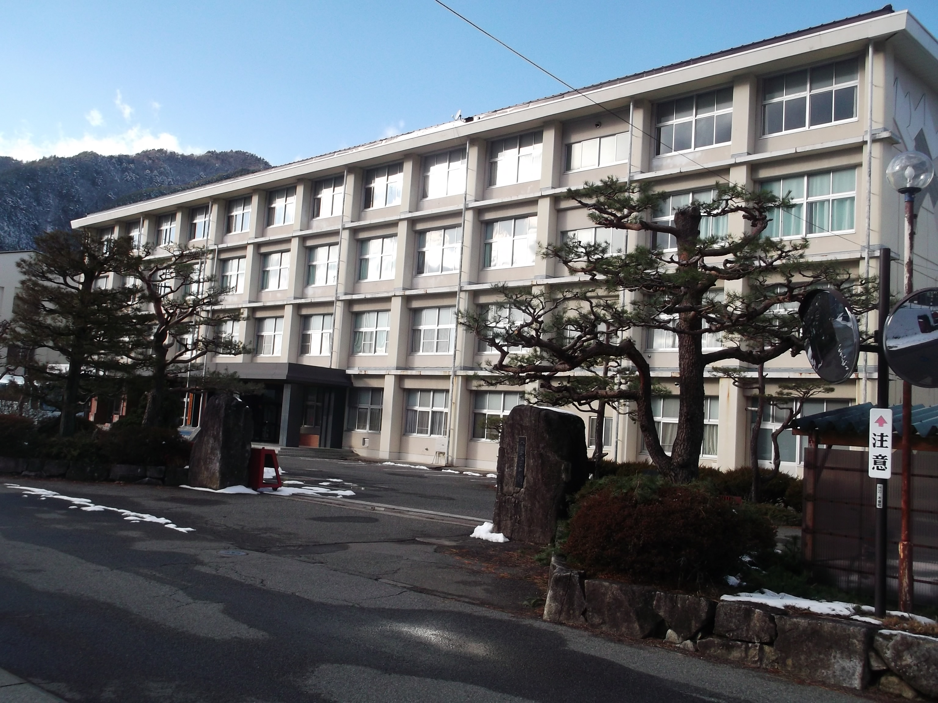 長野県立木曽青峰高等学校 丘の上キャンパス